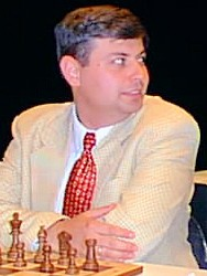 Boris Alterman, Recklinghäuser Schachtage 1998.